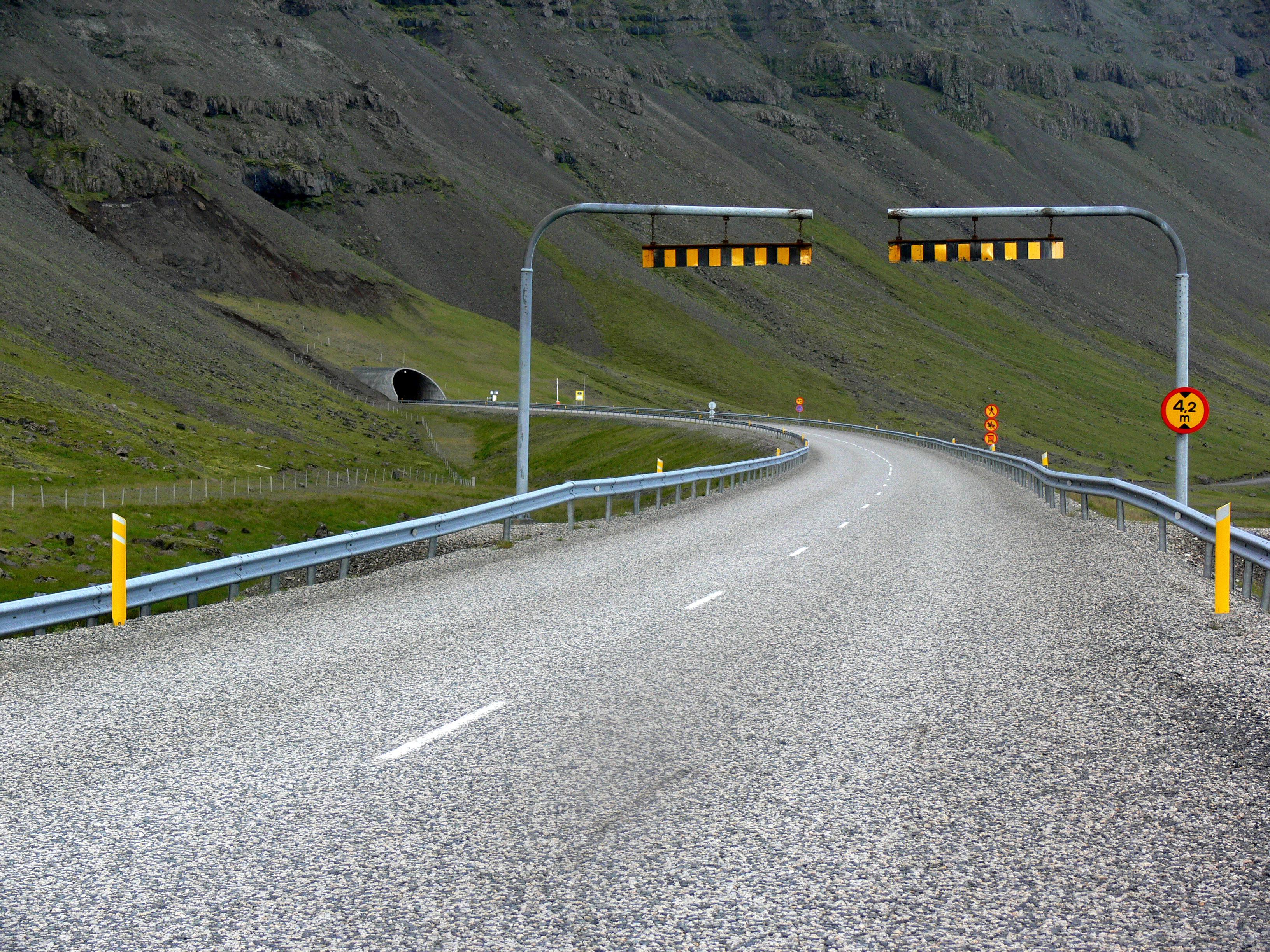 Almannaskarðsgöng auf der Seite von Höfn.